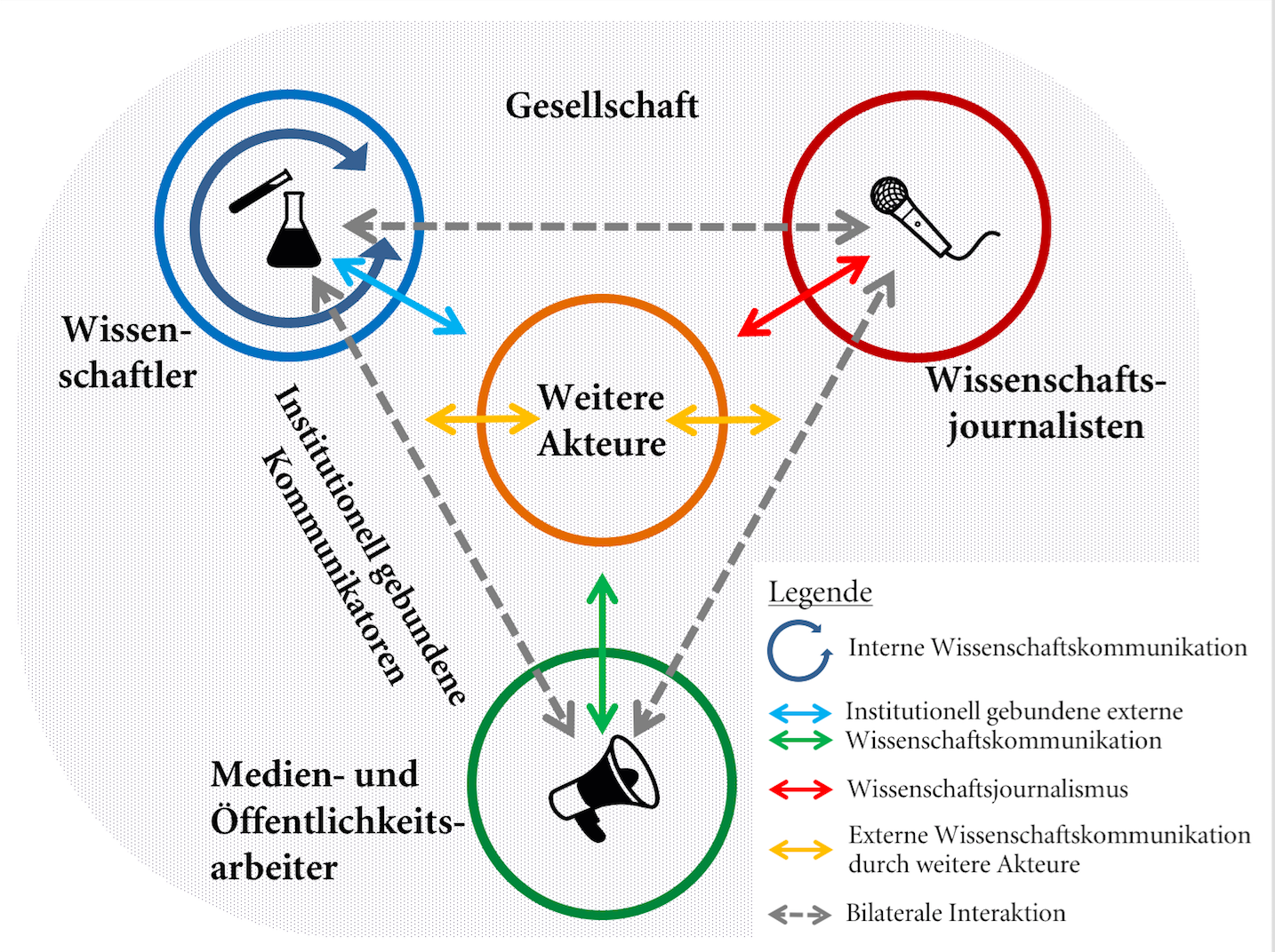 Schematische Übersicht über das Feld und die Akteure der Wissenschaftskommunikation nach Carsten Könneker